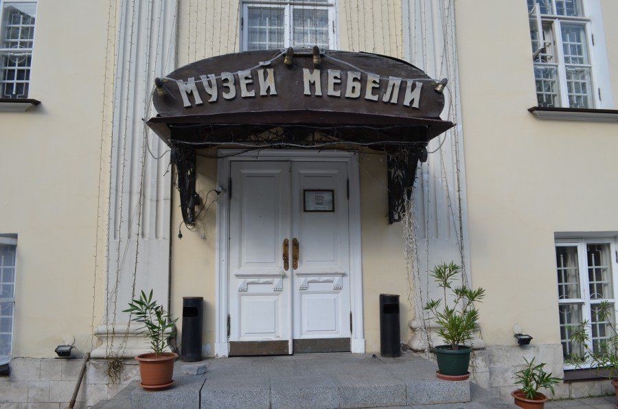 Вывеска на здании "Музея Мебели", Таганская 13